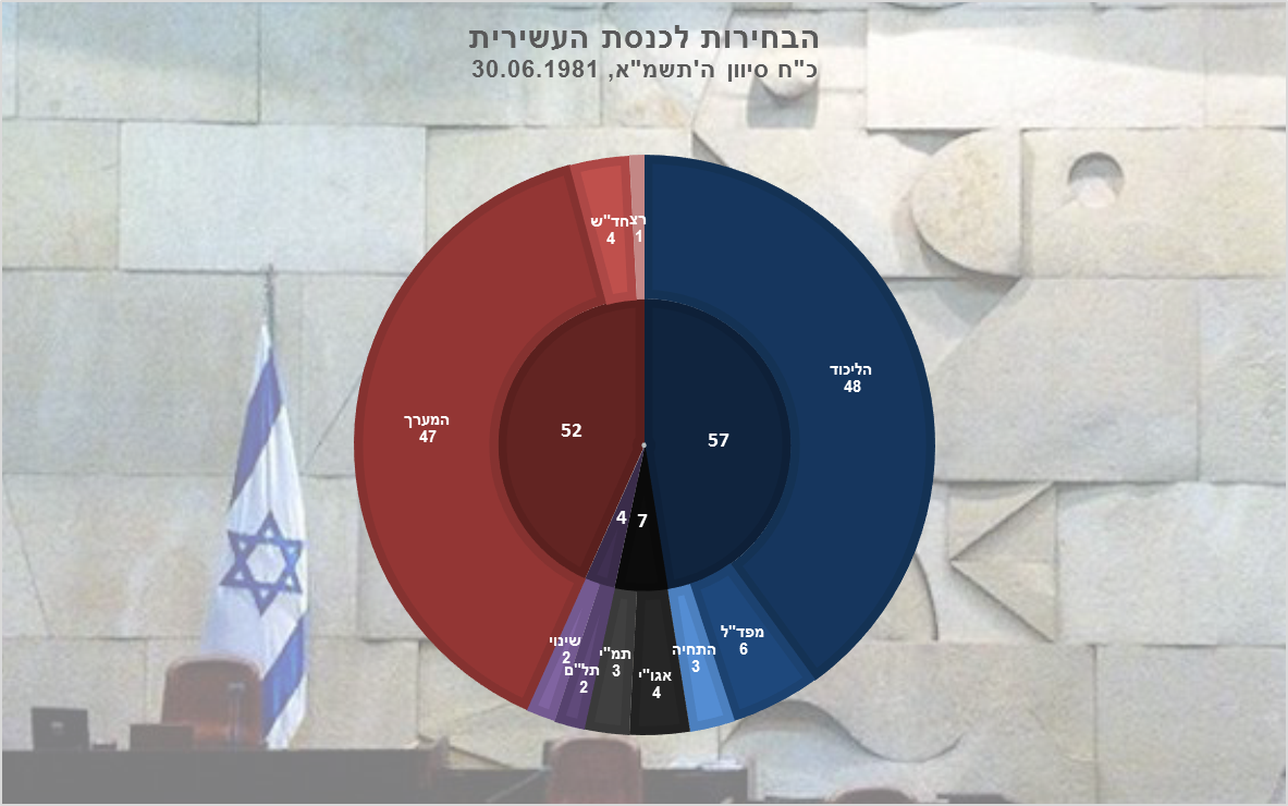 תוצאות הבחירות לכנסת העשירית